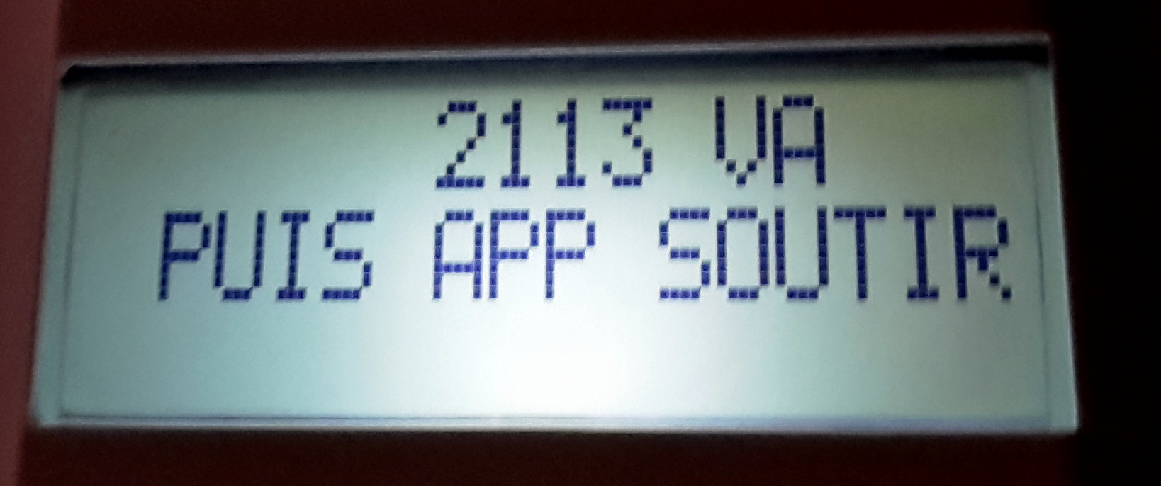 Puisance apparente instanée compteur Linky